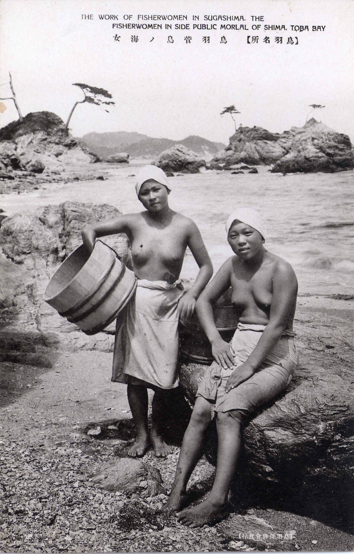 鳥羽海女。